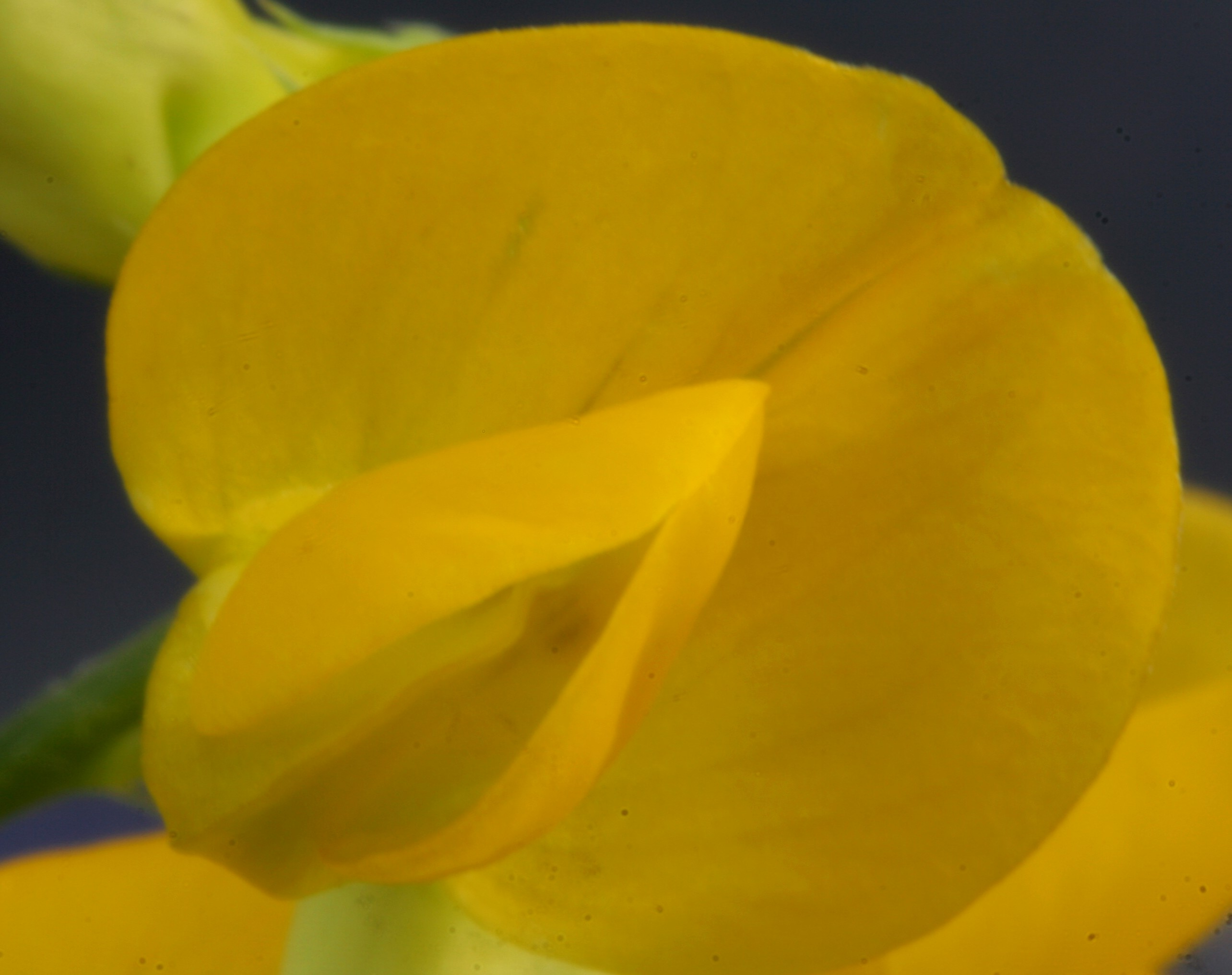 Lathyrus_pratensis (Cicerchia dei prati) Località Cortina (BL) 1300 m s.l.m.